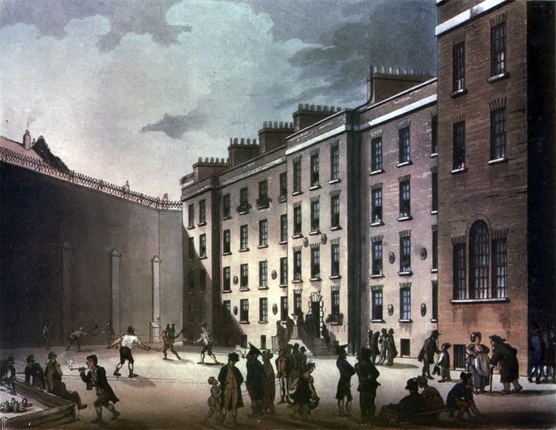 Fleet Prison